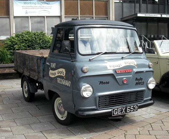 1962 Ford 402E